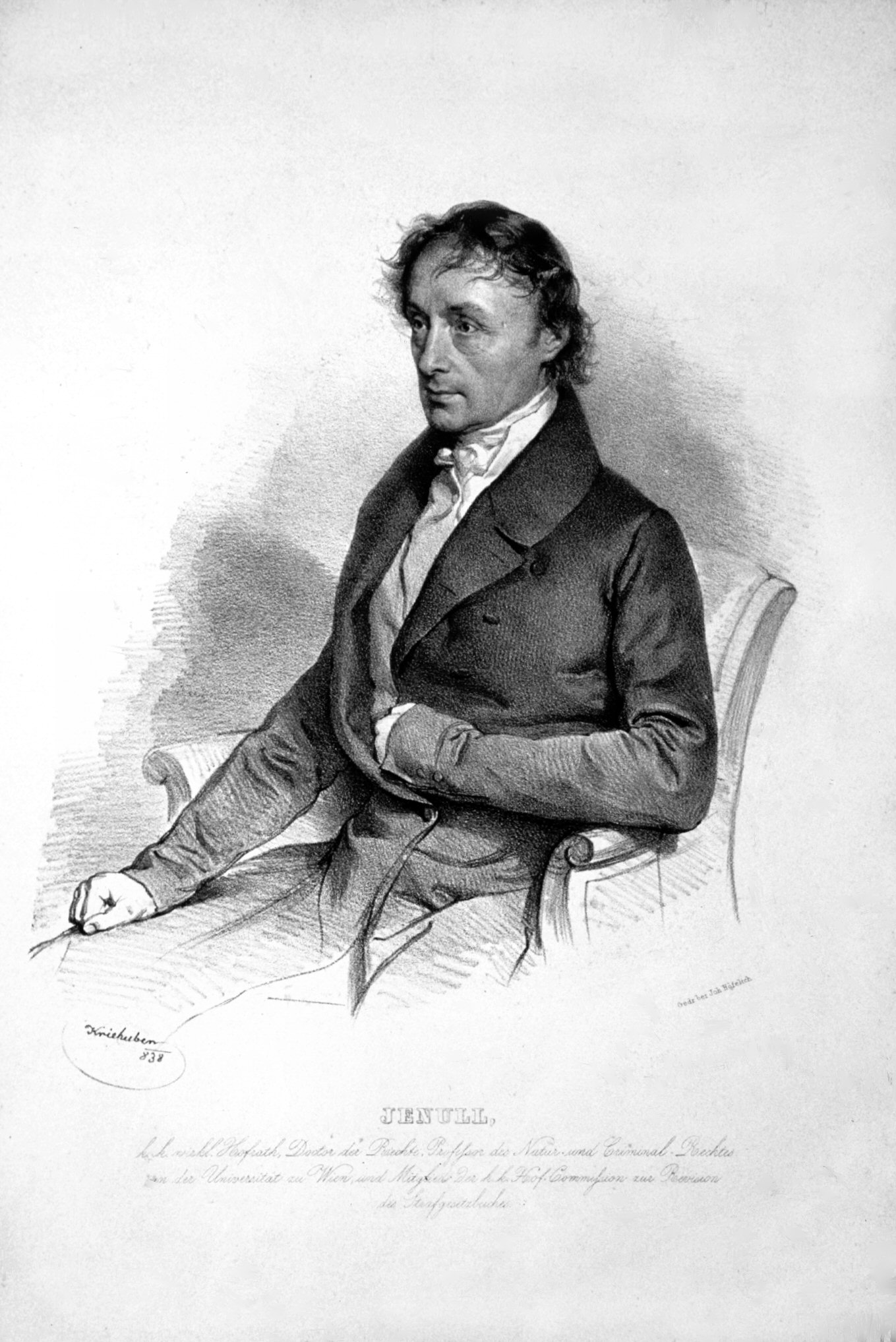 Sebastian Jenull (1777-1848), Jurist, Hofrat, Rektor der Universität Wien. Lithographie von Josef Kriehuber, 1838